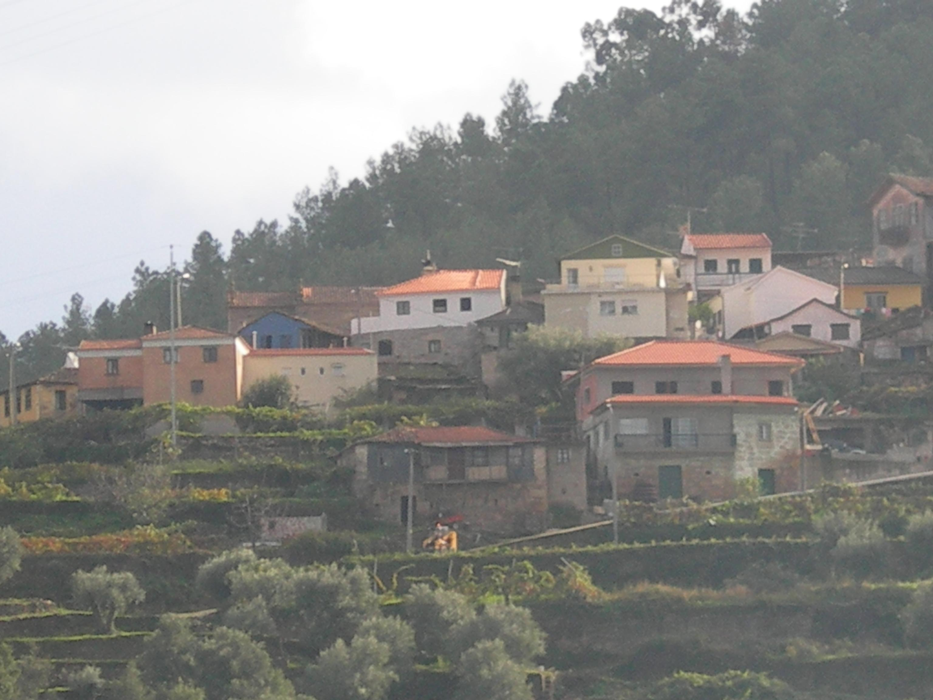 Foto de Santo Adriao